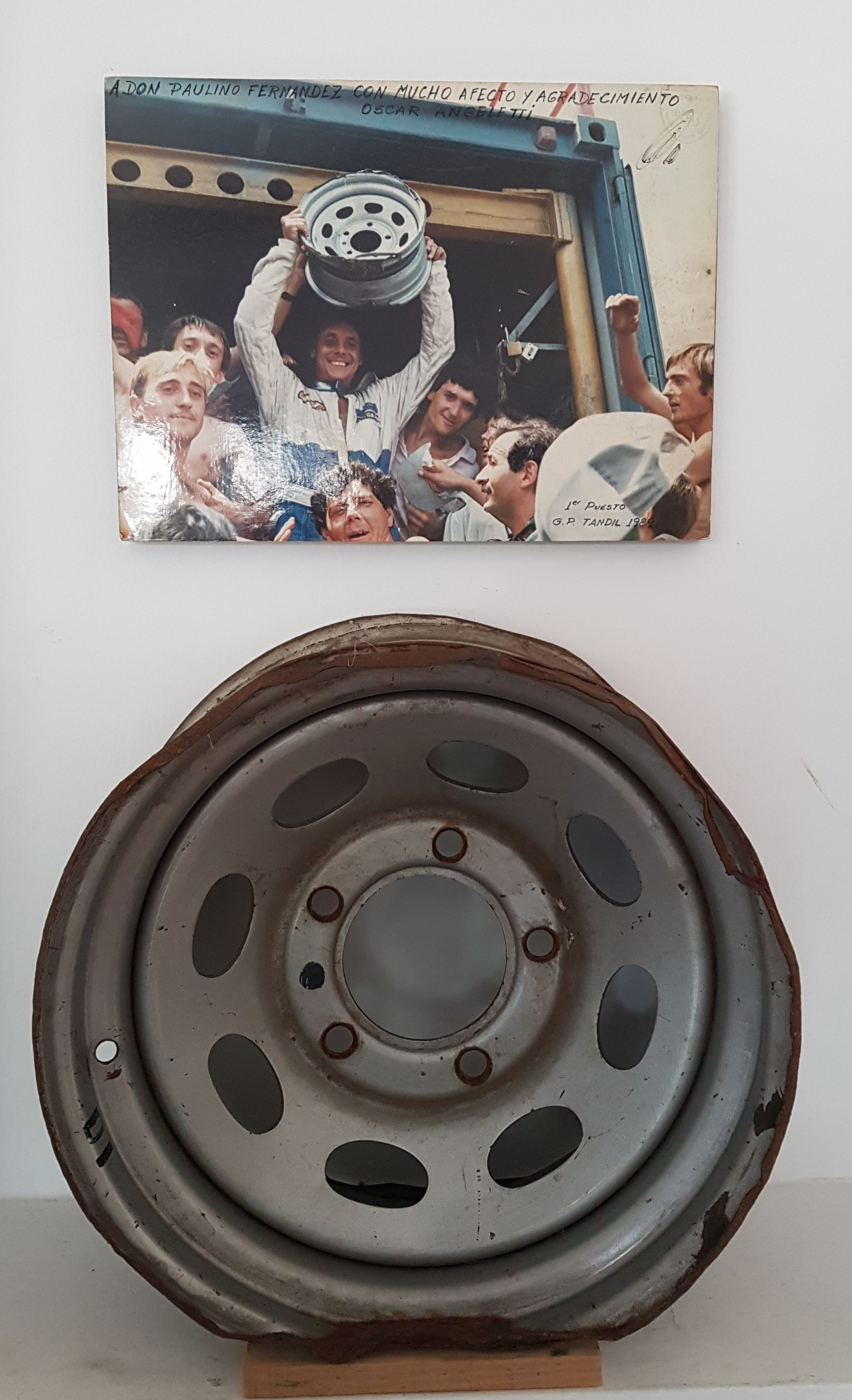 Esta es la llanta con la que termino la carrera de Tandil 89. Angeletti se la regalo a mi abuelo, que trabajaba en Cimetal, despues de la carrera junto con la foto y una hermosa dedicatoria.